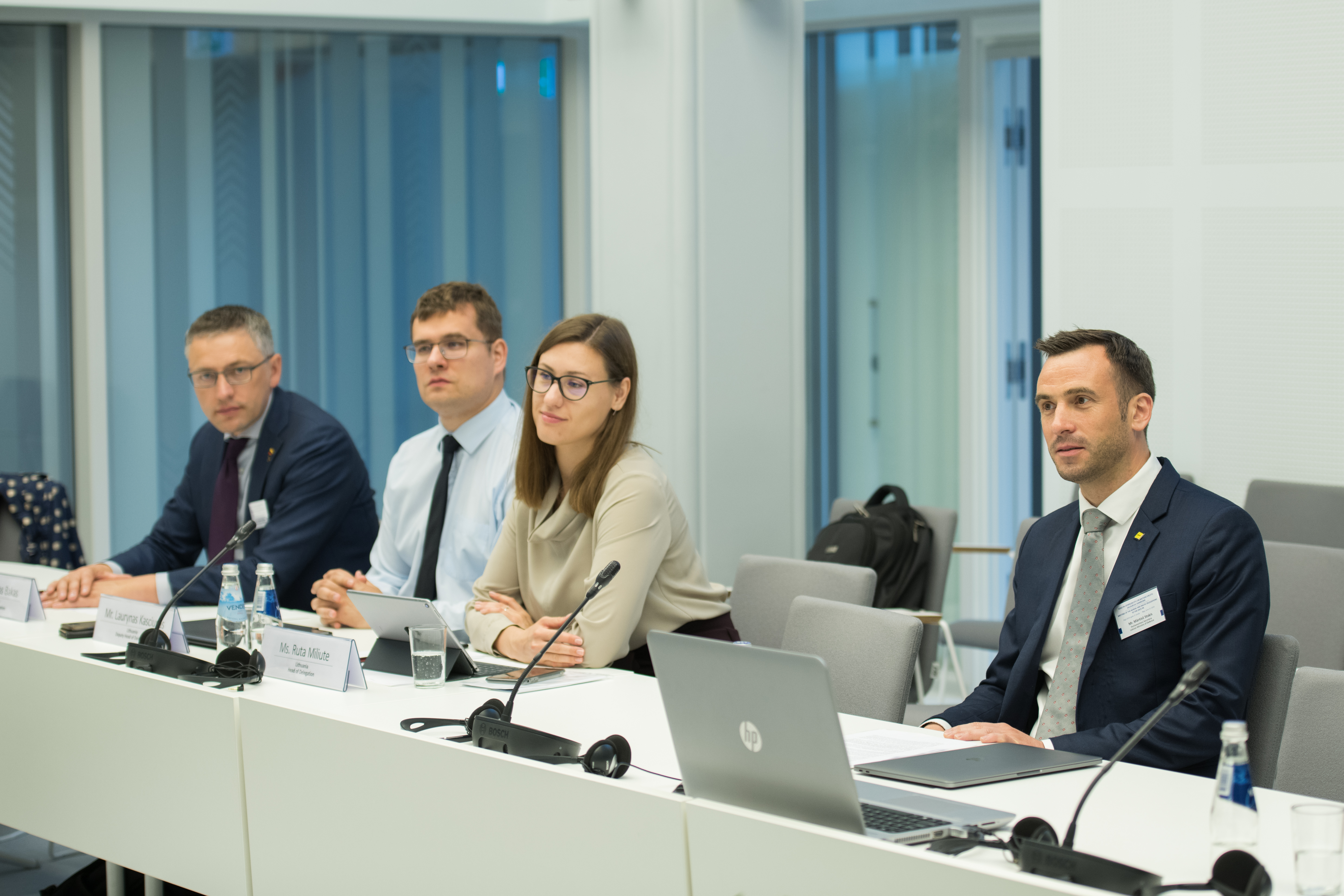 EDSO Parlamentārās asamblejas Ziemeļvalstu un Baltijas valstu delegāciju sanāksme Saeimā.